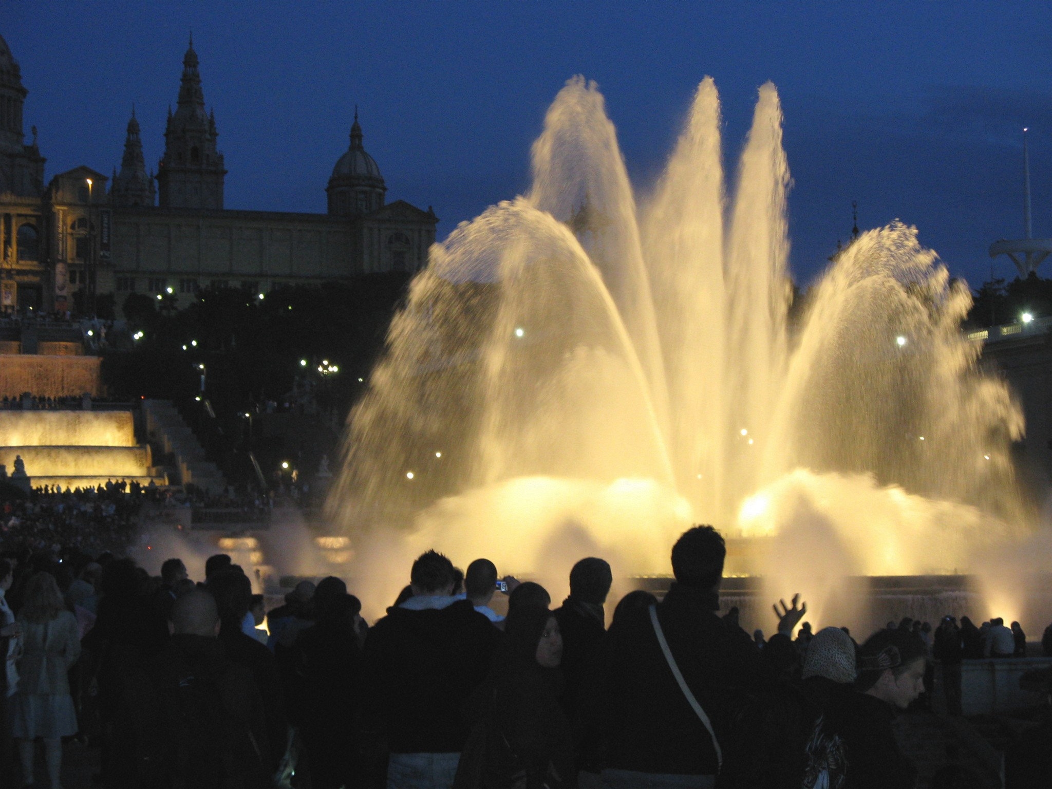 Музыкальный фонтан в Барселоне